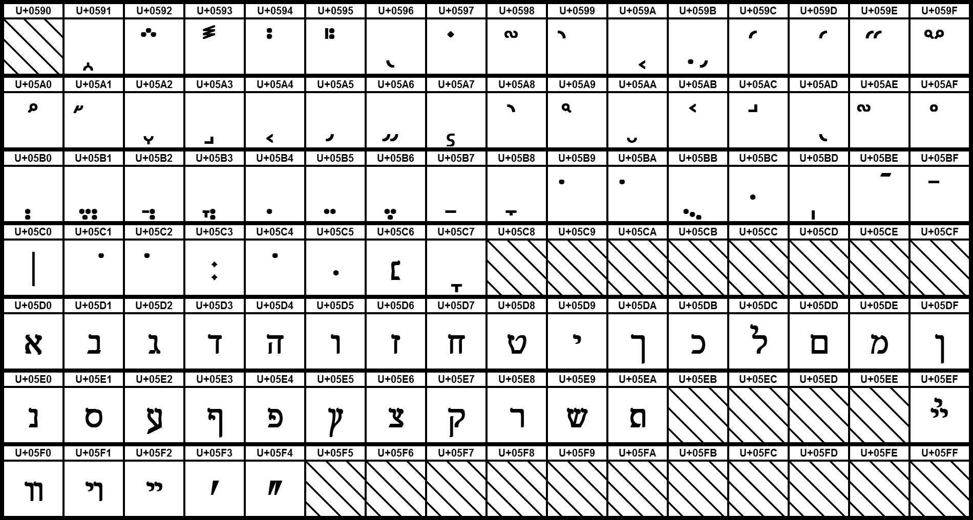 Grafiktafel für den Unicodeblock Hebräisch. Schraffierte Felder sind unbesetzte Codepoints.